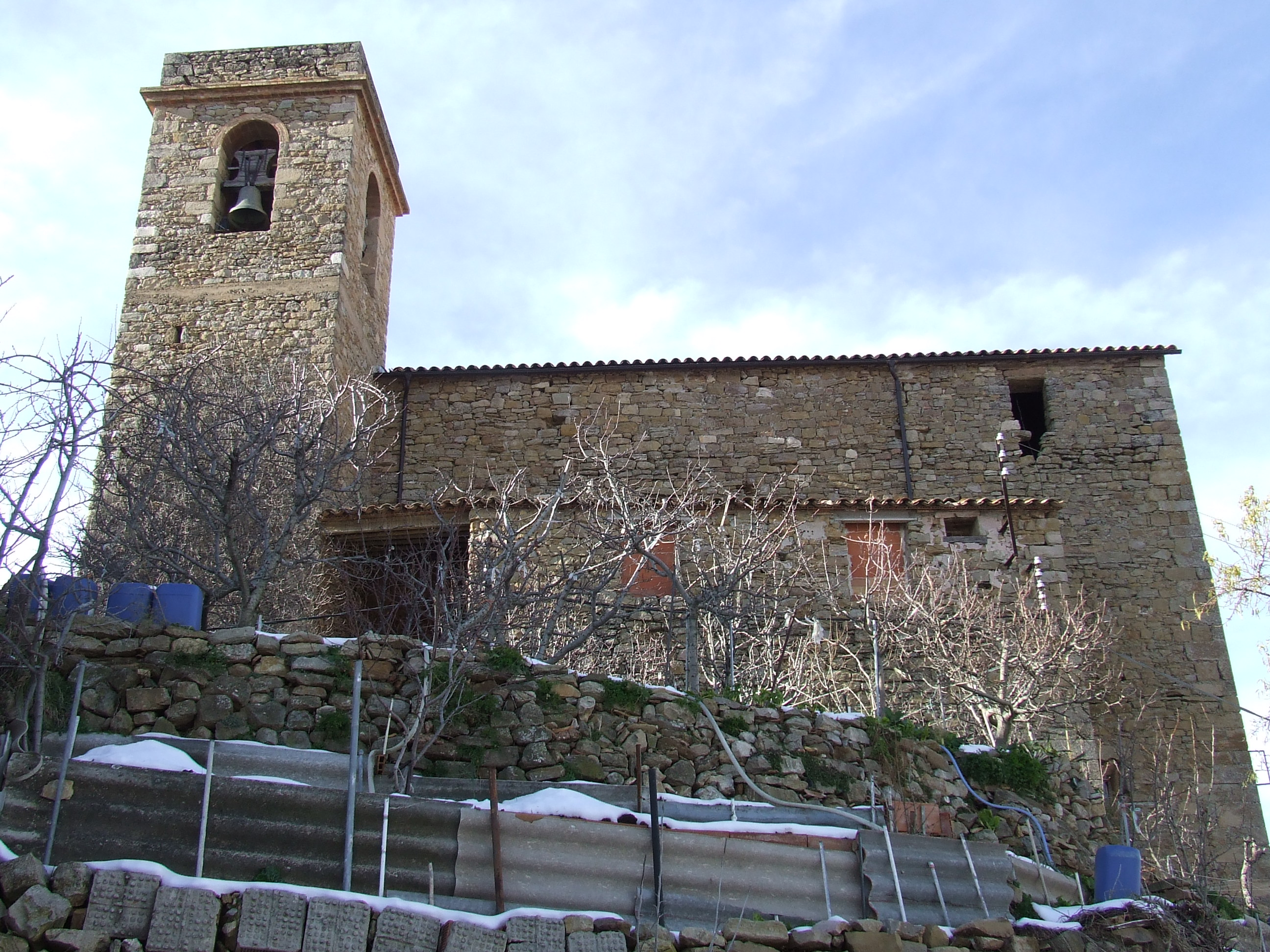 Església parroquial de Sant Salvador de Toló (Gavet de la Conca, Pallars Jussà)